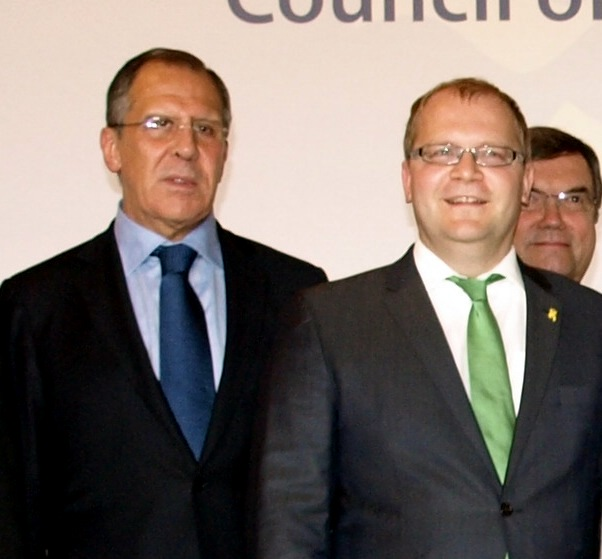 Välisminister Urmas Paet kohtus Oslos Venemaa välisministri Sergei Lavroviga. 7. juuni 2011